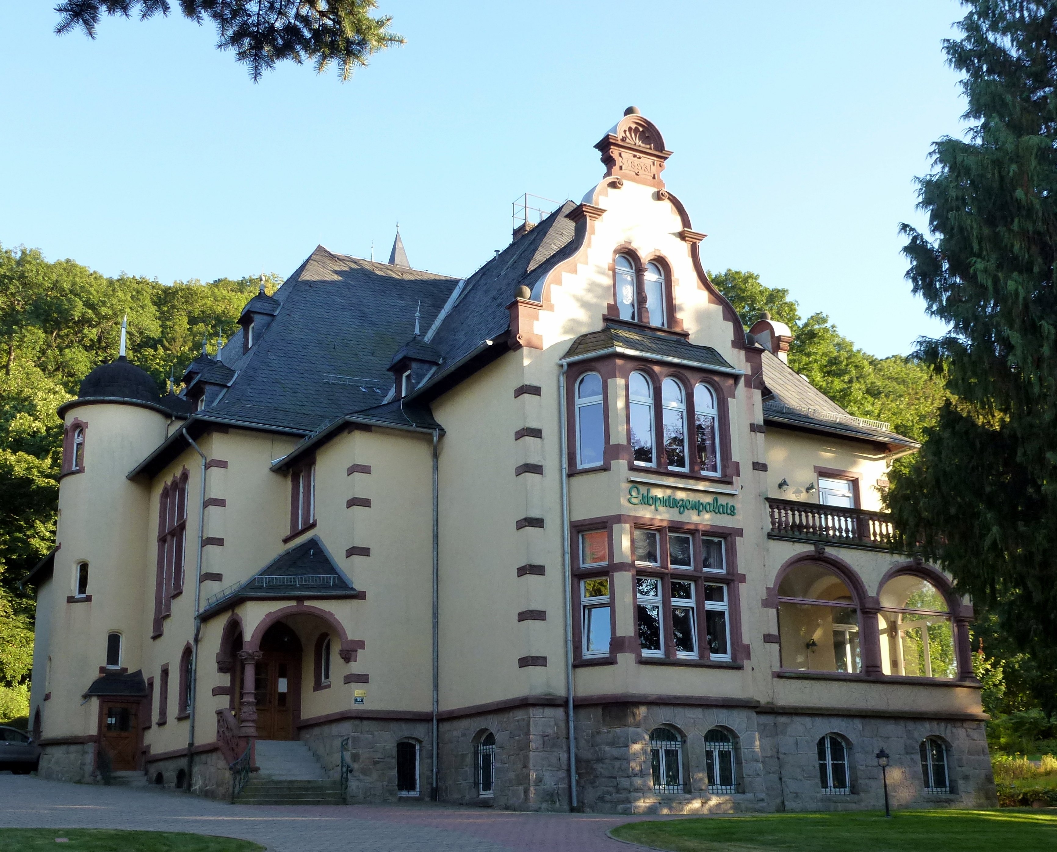 Das denkmalgeschützte Haus Lindenallee 27 in Wernigerode wird heute als Hotel genutzt.